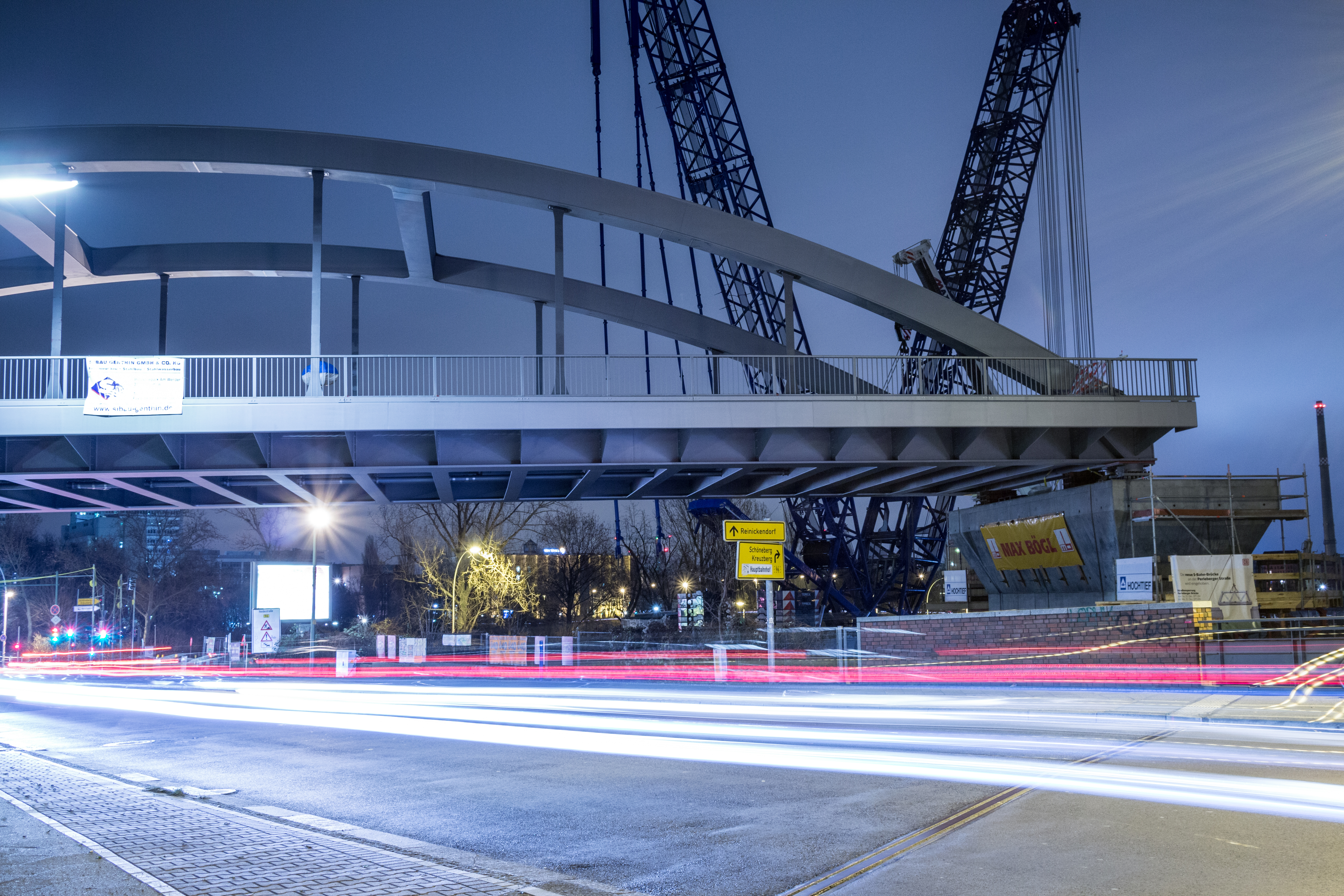 Neu eingehobene S-Bahn-Brücke an der Perleberger Brücke für die S21 Wedding-Hauptbahnhof